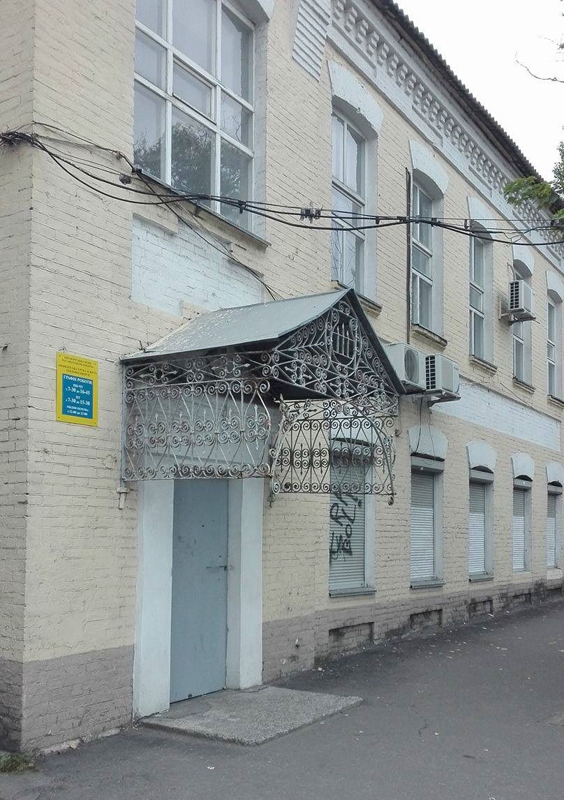 Бывшее здание трамвайного управления в городе Кременчуг (Украина)